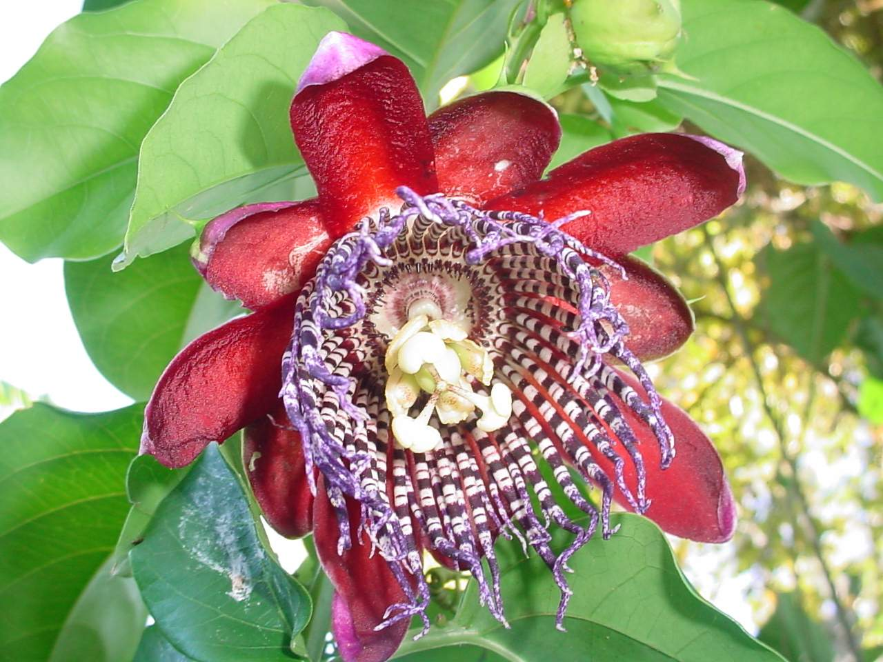 Flor de maracujá